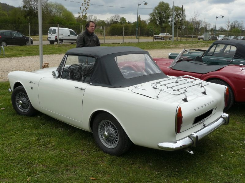 Mantes la Jolie 2012